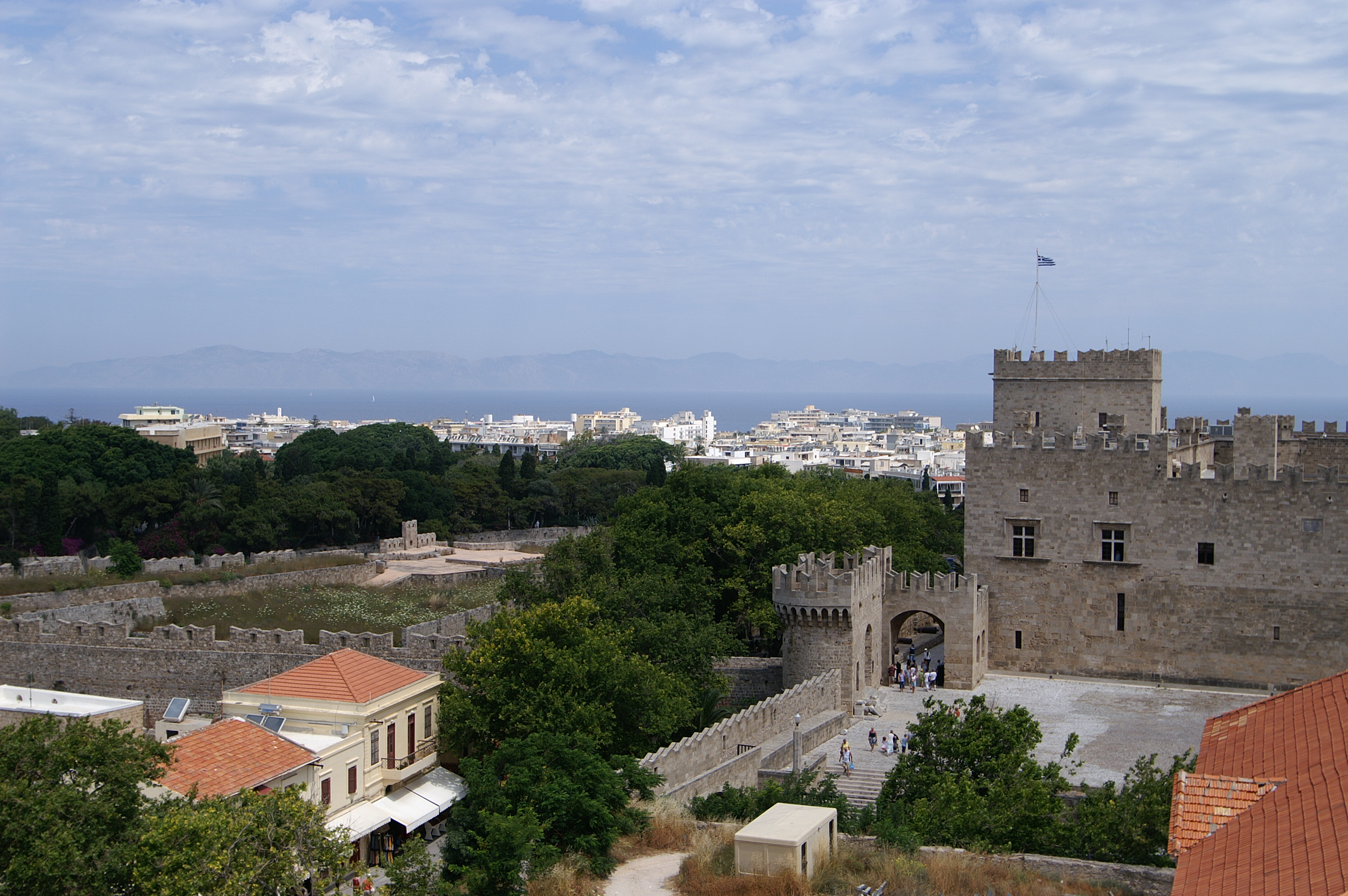 Blick vom höchsten Punkt auf dem Glockenturrm des "ROLOI" Uhrturm in der Altstadt von Rhodos.